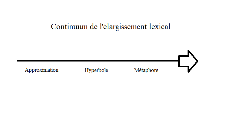 Continuum de l'élargissement lexical selon la théorie de la pragmatique lexicale, qui analyse les figures de style.